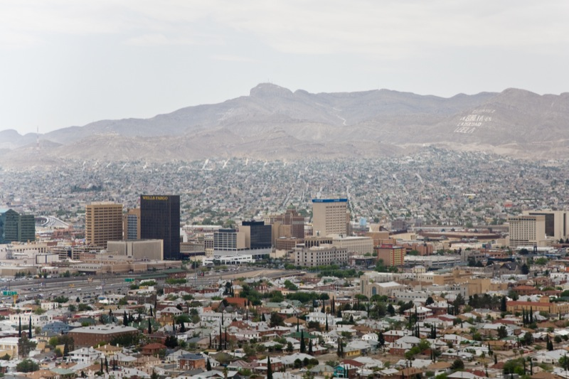 El Paso & Ciudad Juárez from Scenic Drive